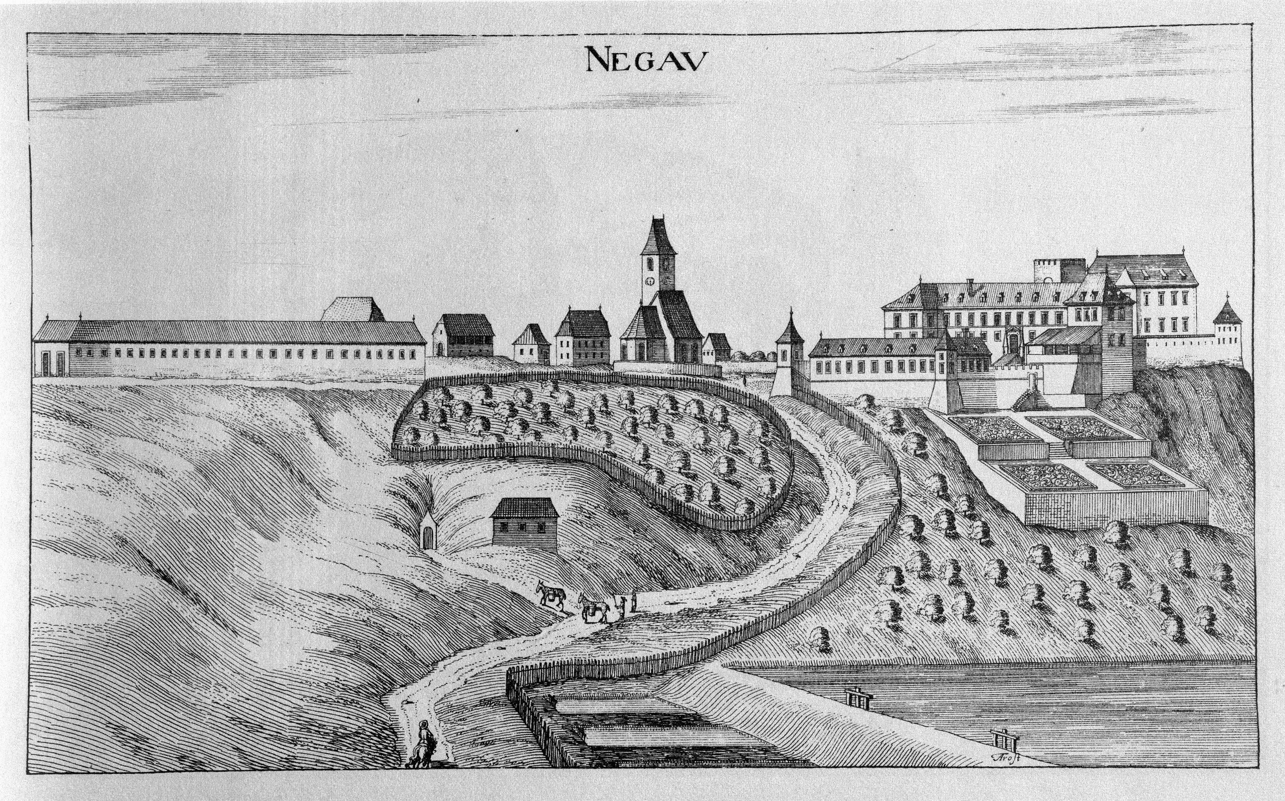 G. M. Vischers Käyserlichen Geographi, Topographia Ducatus Stiriae, Das ist: Eigentliche Delineation / und Abbildung aller Städte / Schlösser / Marcktfleck / Lustgärten / Probsteyen / Stiffter / Clöster und Kirchen / so es sich im Herzogthumb Steyrmarck befinden; Und anjetzo Umb einen billichen Preyß zu finden seynd Bey Johann Bitsch Universitäts Buchhandlern / Auff dem Juden=Platz bey der guldenen Saulen. Graz 1681 Die Nummerierung der Dateien folgt der alphabetischen Reihung der Ortsnamen